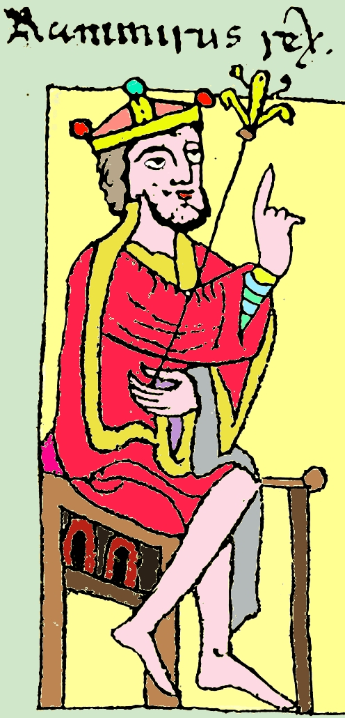 Ramiro I de Aragón y su hijo, Sancho Ramírez. Miniatura del siglo XIII de Jaca. (Huesca, Aragón, España). Coloreado por Escarlati a partir de la imagen original (véase abajo).